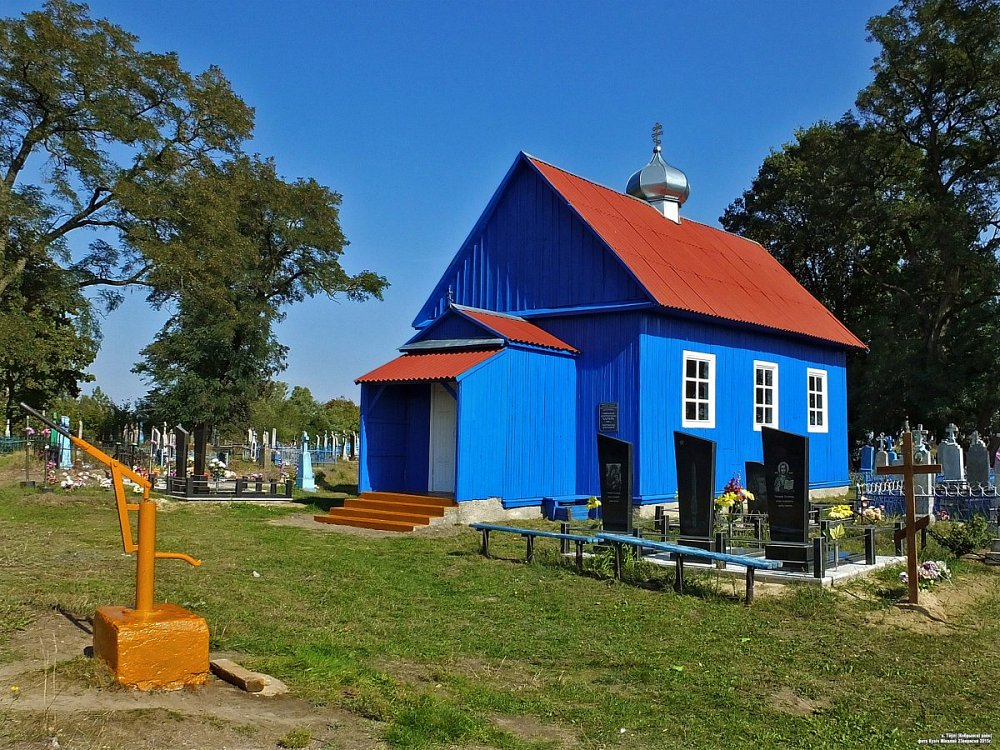 Тэўлі. Капліца Святога Дзмітрыя Салунскага